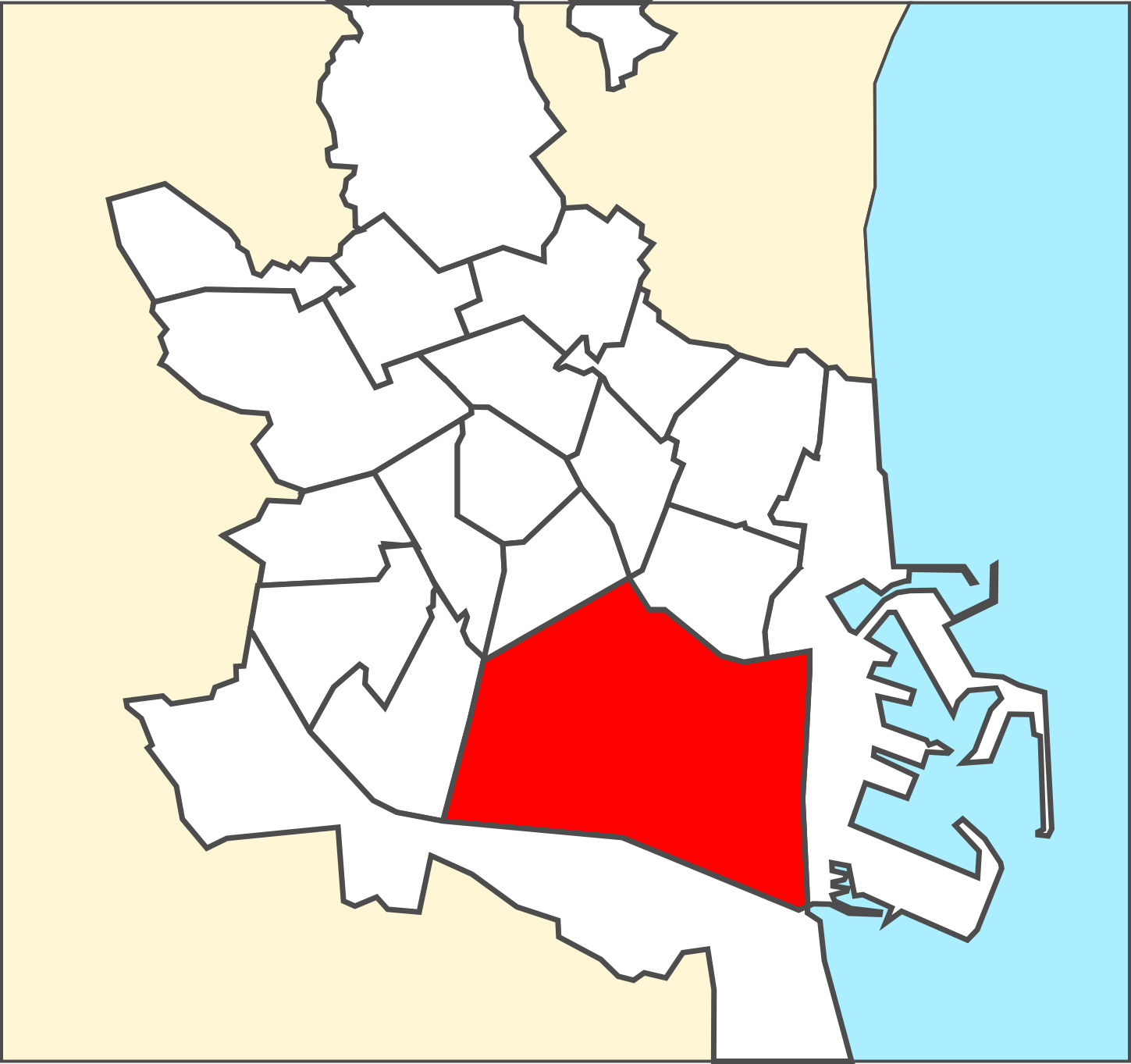 Districte de Quatre Carreres.